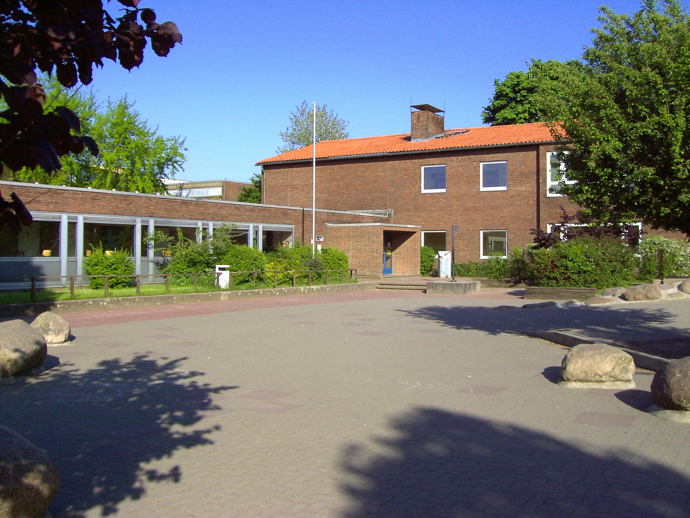 Haupteingang der Schule Remlingen (Niedersachsen)